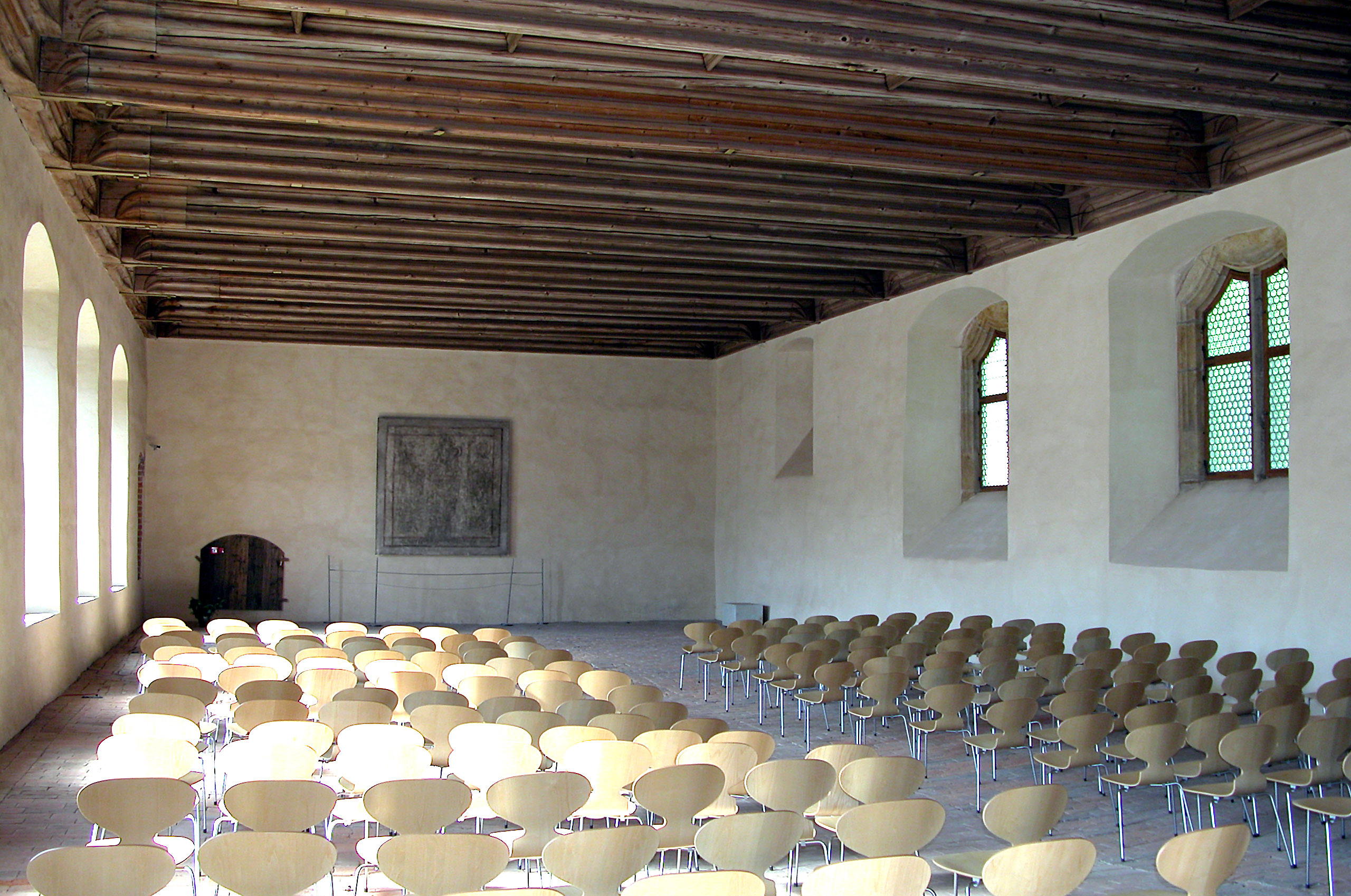 30.05.2003 01683 Altzella (Nossen): Kloster Altzella. Konversenhaus (GMP: 51.060562,13.276050). Ehemaliger Schlafsaal im Obergeschoß. Ab 1505 Bibliothek. [DSCNx.JPG]20030530450JPG(c)Blobelt